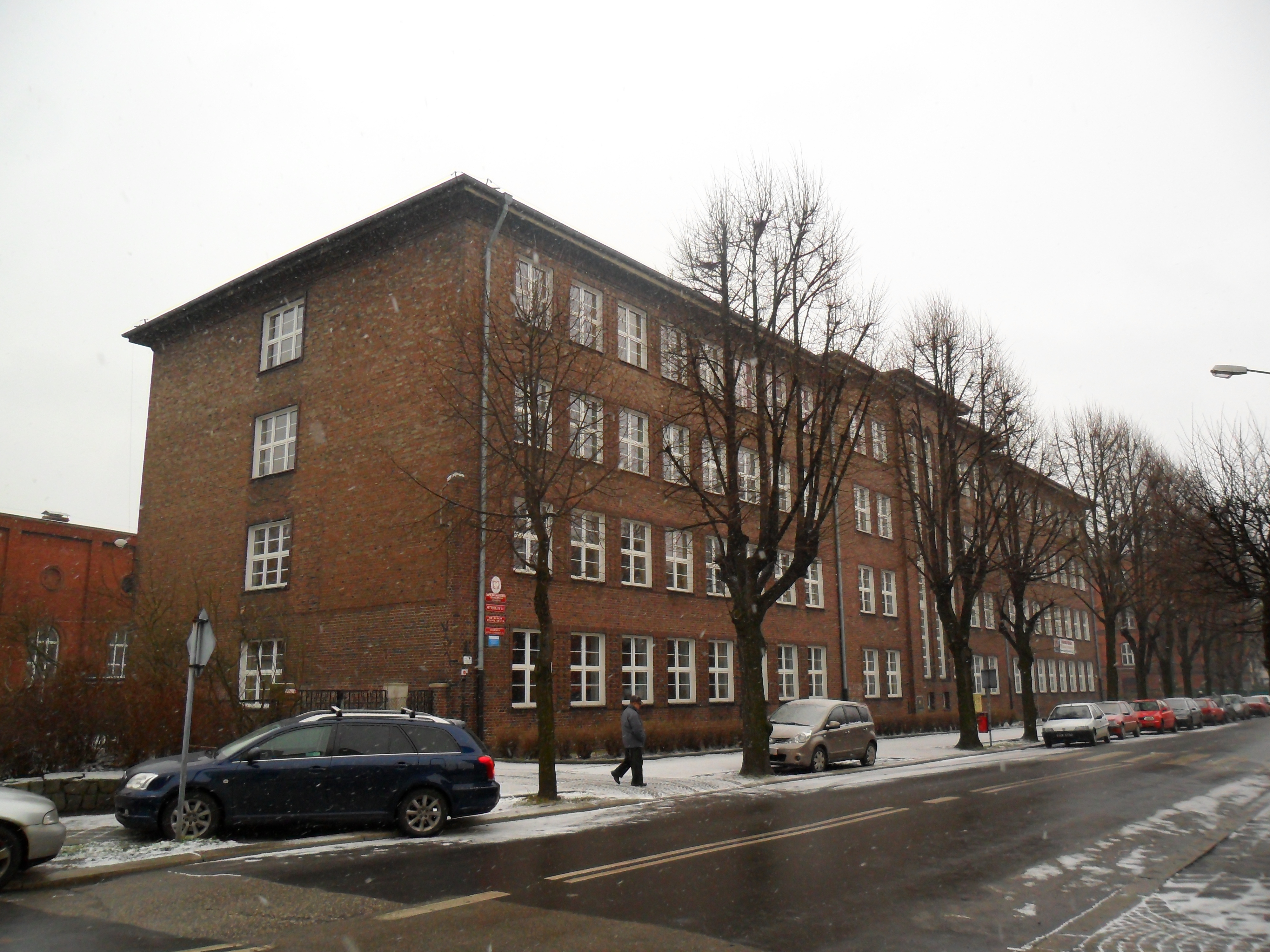 Zespół Szkół Budowlanych w Raciborzu